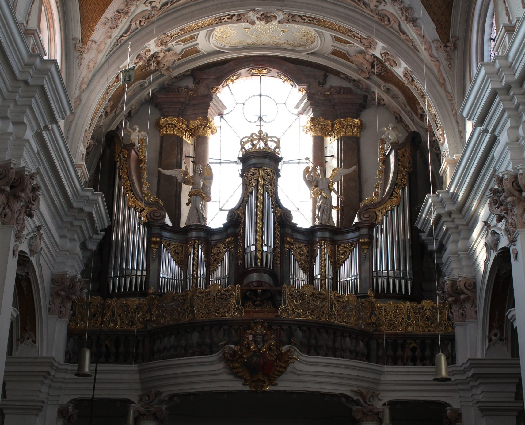 Orgel der Klosterkirche Rohr in Niederbayern (2006, Metzler, II/29; Prospekt von J. K. Brandenstein, 1725)